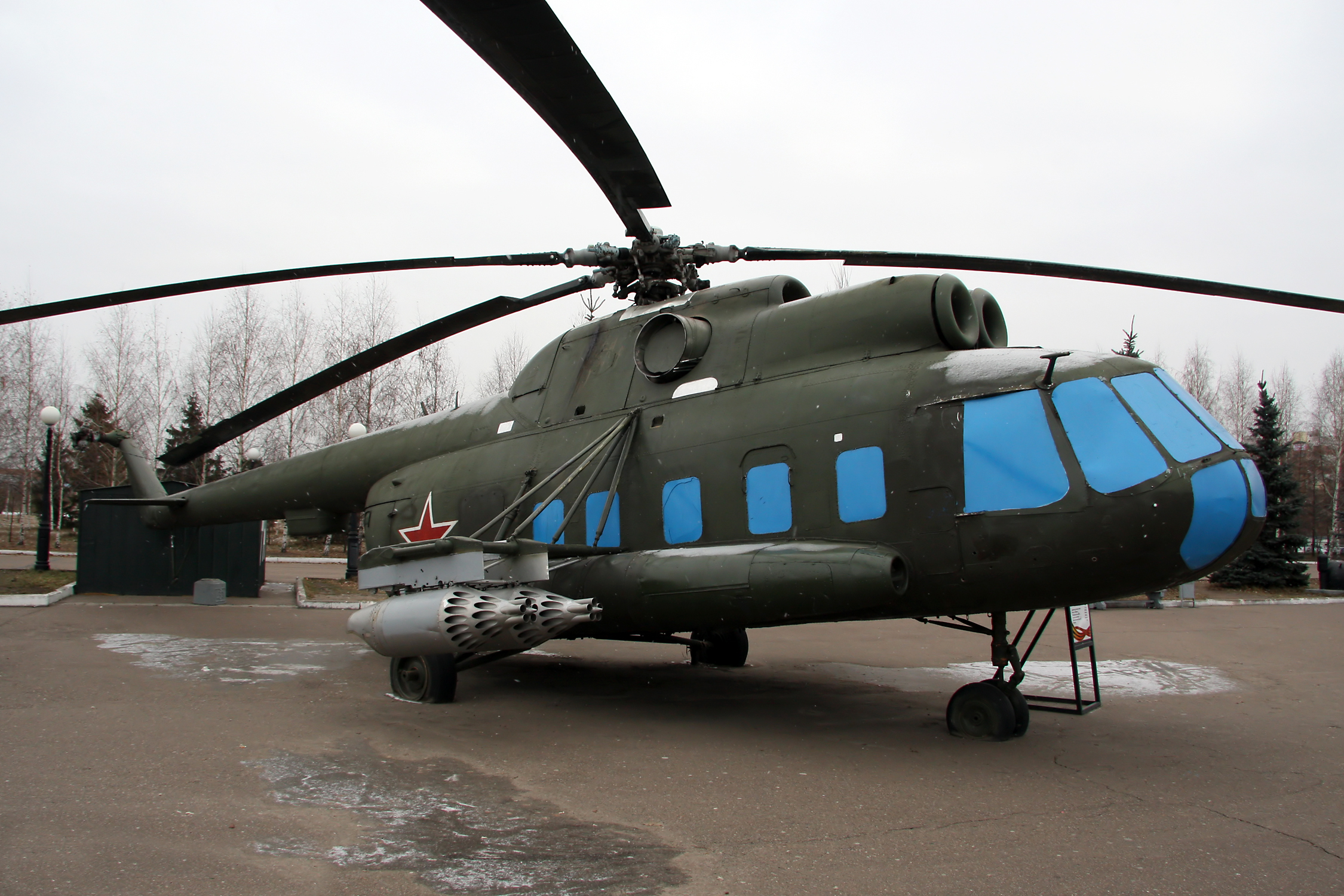 Ми-8 (Mi-8)